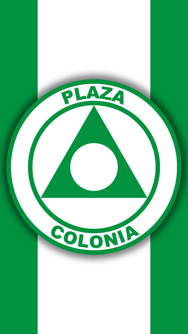 Escudo de Plaza Colonia